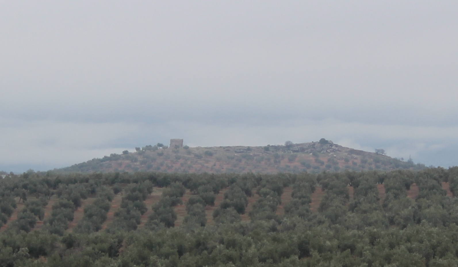 Cerro en el que se encuentra, en el lado izquierdo de la imagen, la torre del Risquillo.